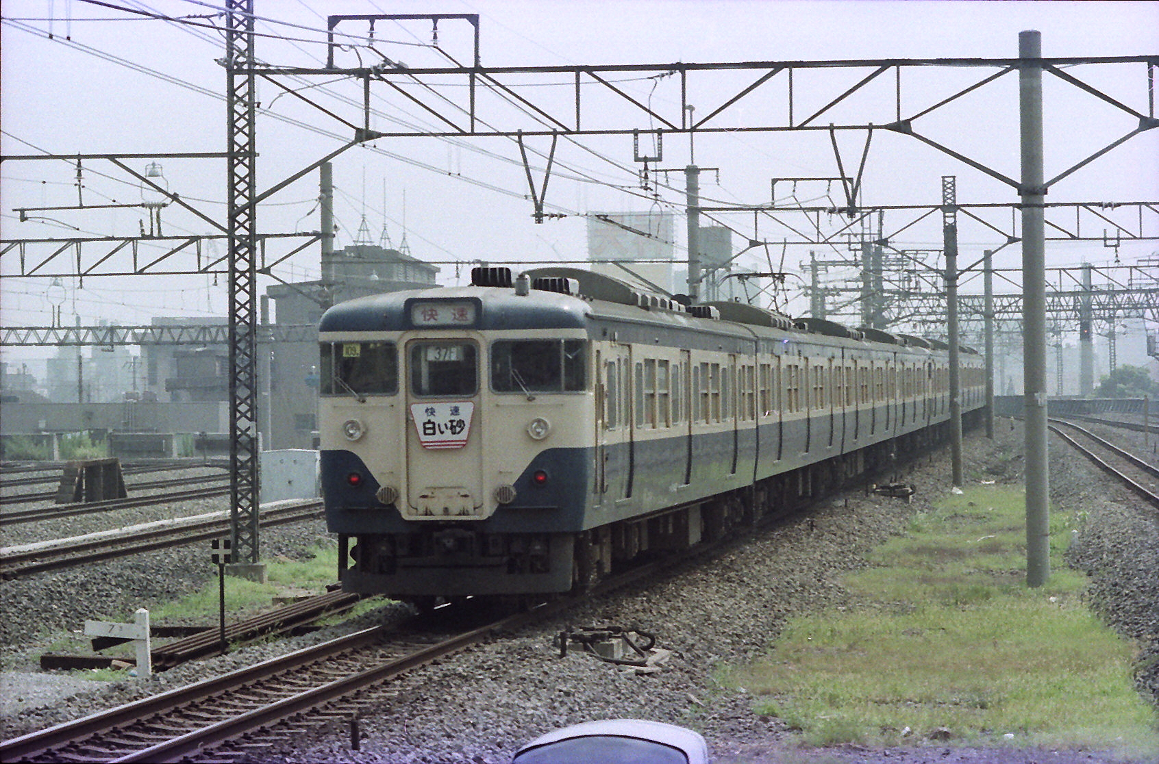 総武線 錦糸町駅 快速「白い砂」